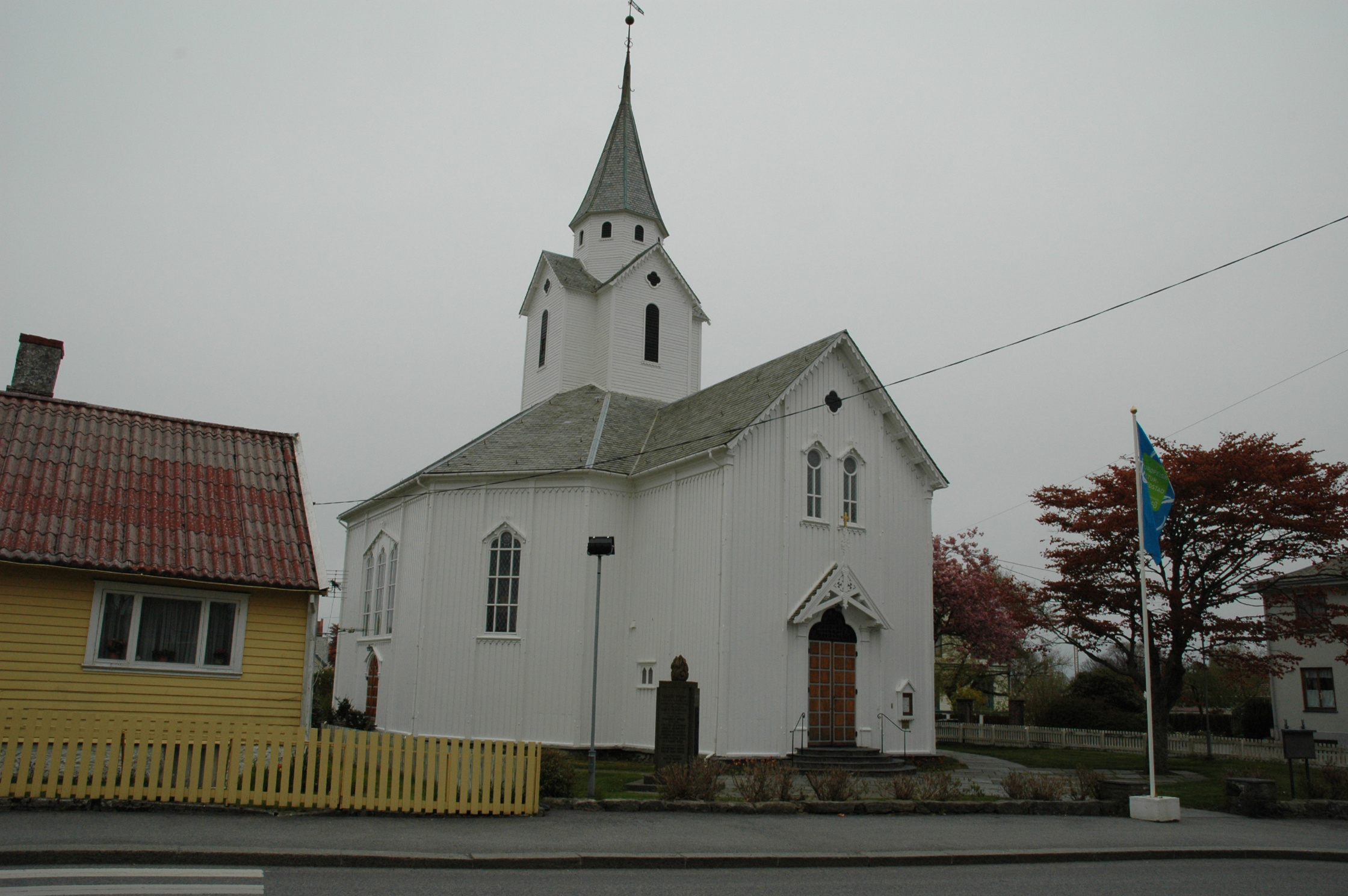 Skåre kirke i Haugesund